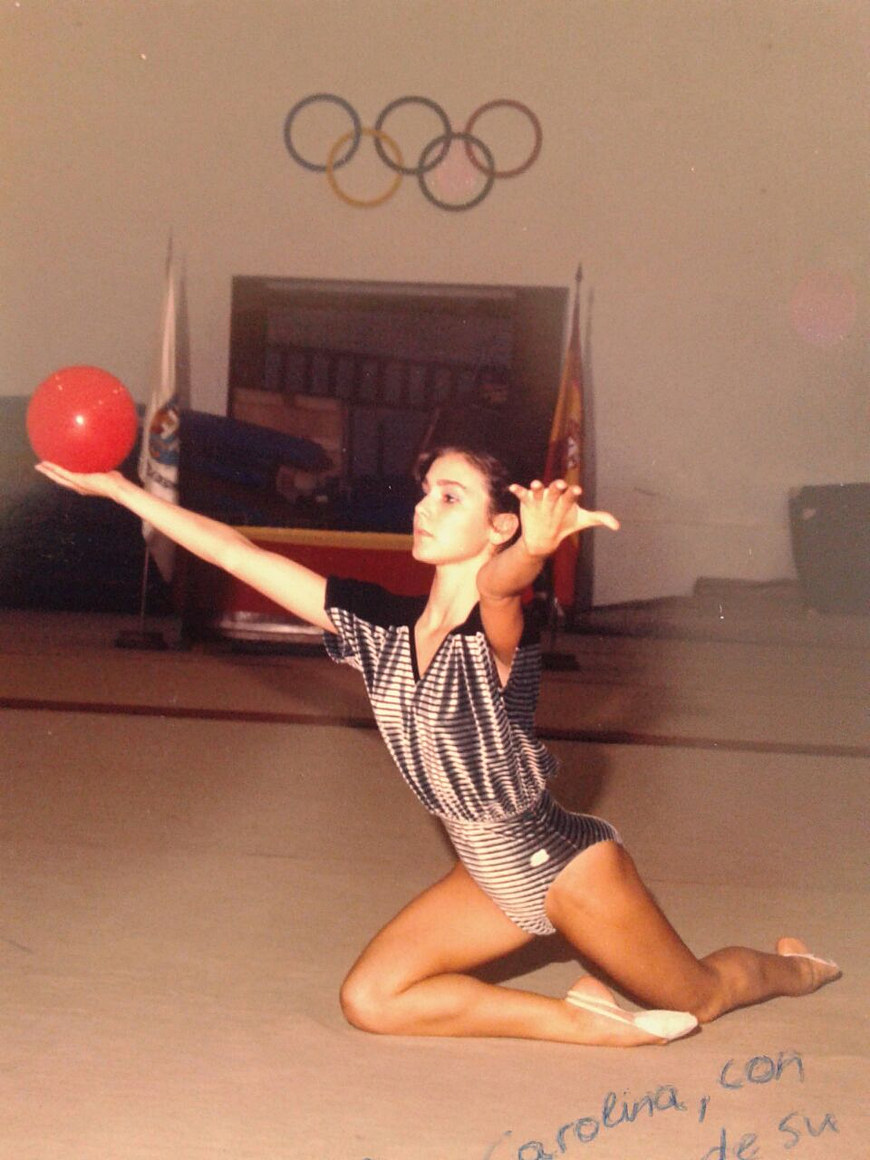 La gimnasta rítmica española Montserrat Manzanares en 1986 en el Gimnasio Moscardó.